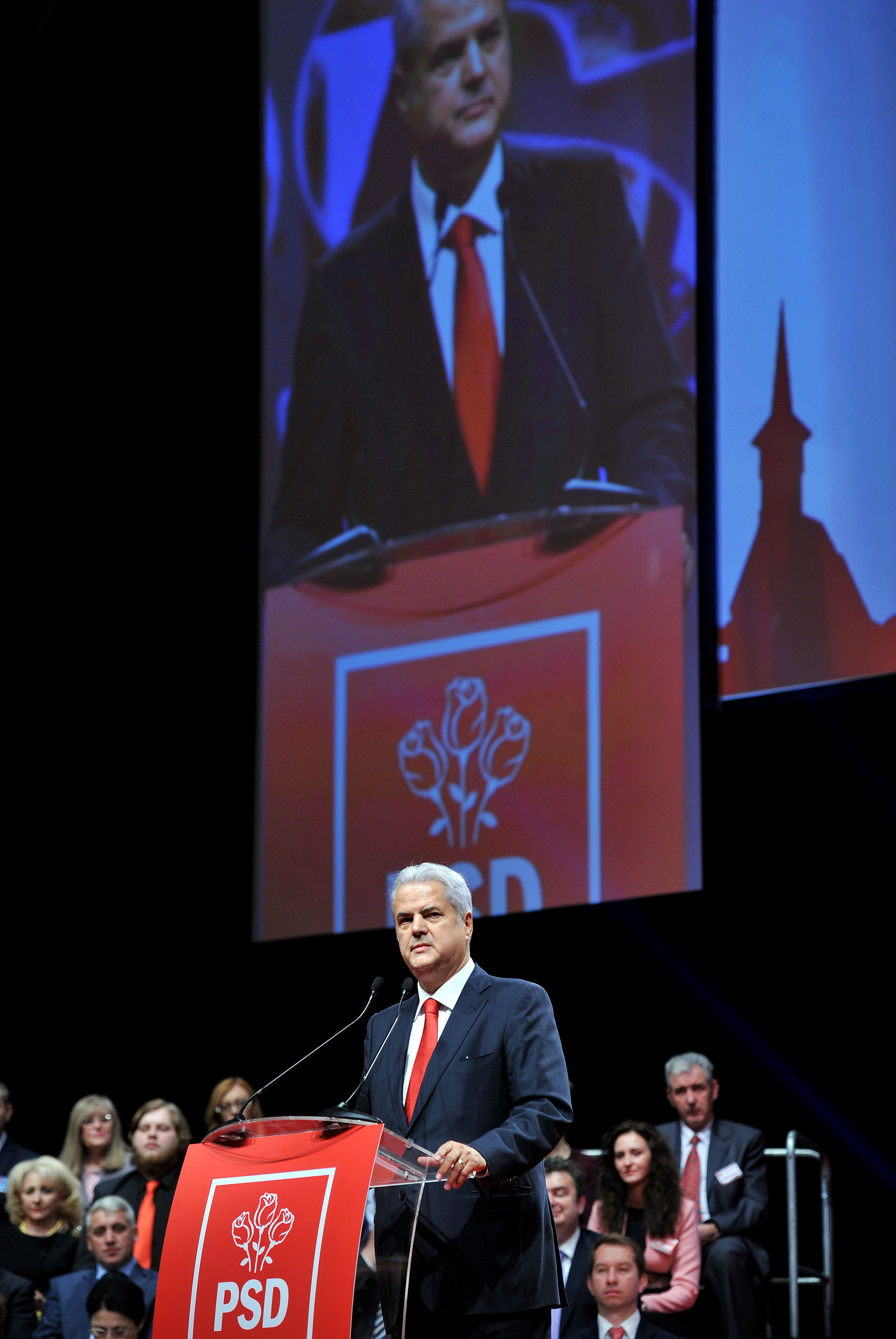 Adrian Nastase la Consiliul National al PSD